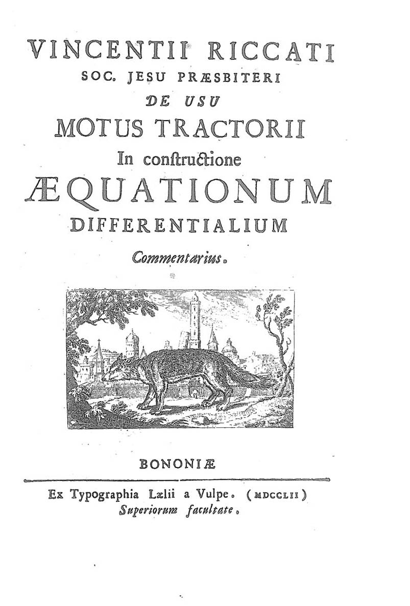 Vincentii Riccati ... De usu motus tractorii in constructione aequationum differentialium commentarius. - Bononiae : ex typographia Laelii a Vulpe, 1752. - 72 p., [3] c. di tav. ripiegate : ill. ; 4º .